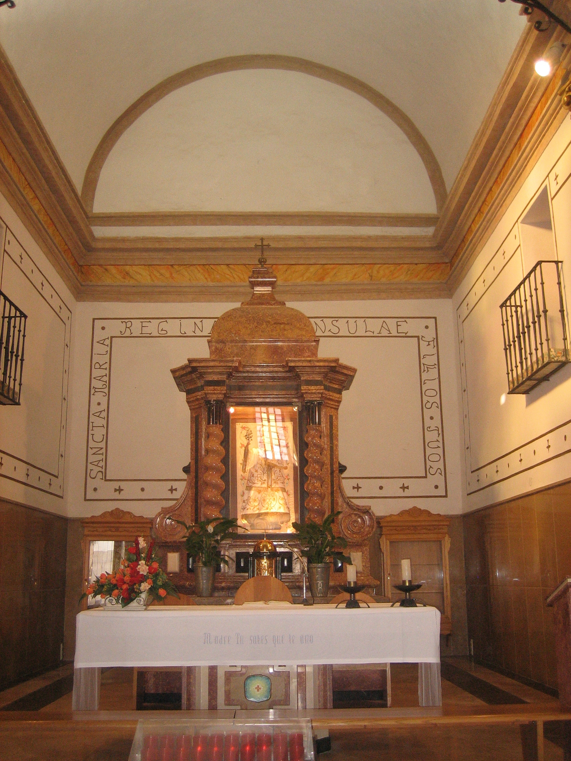 Altar major de l'ermita de l'Ermitana de Peníscola (Baix Maestrat)